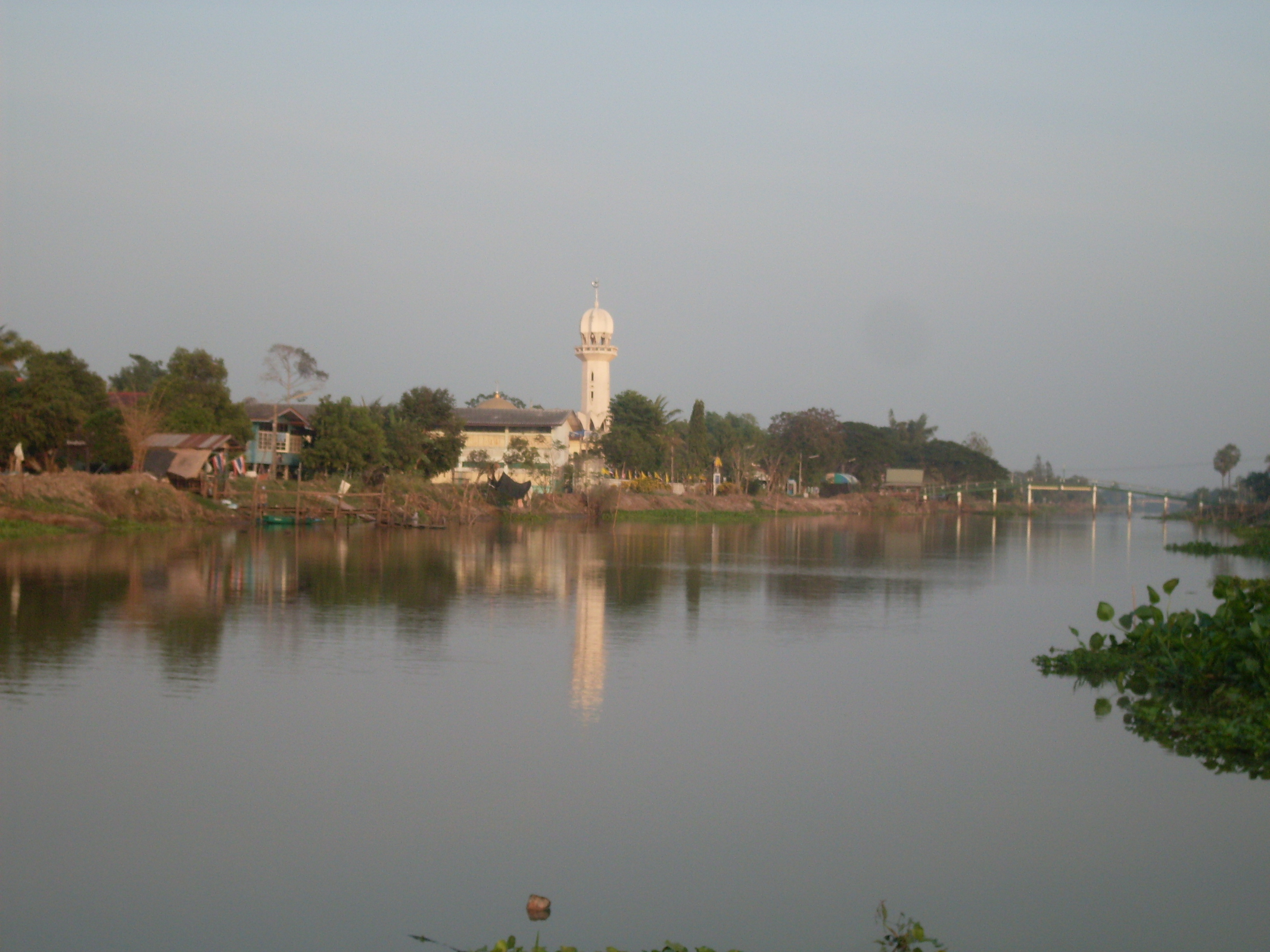 คลองพระยาบันลือ